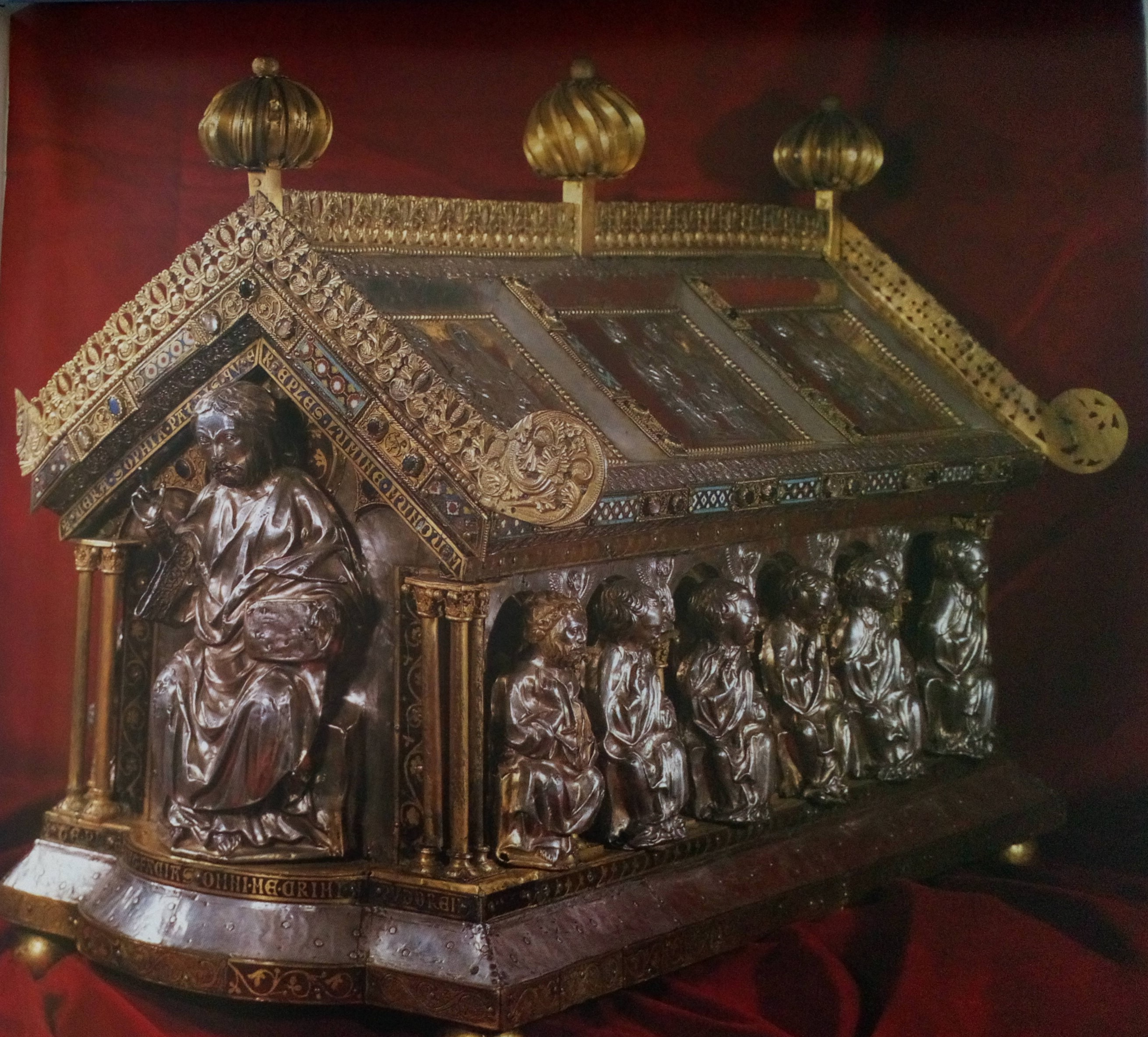 Châsse de saint Firmin 2